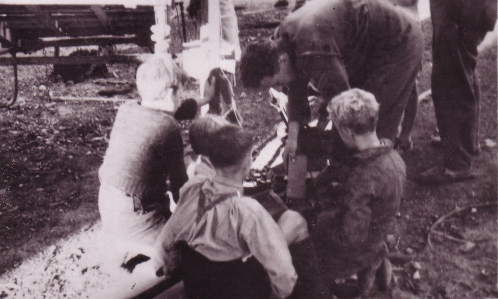 Max Hymans et un container parachuté, probablement à Beylemas, en Dordogne.